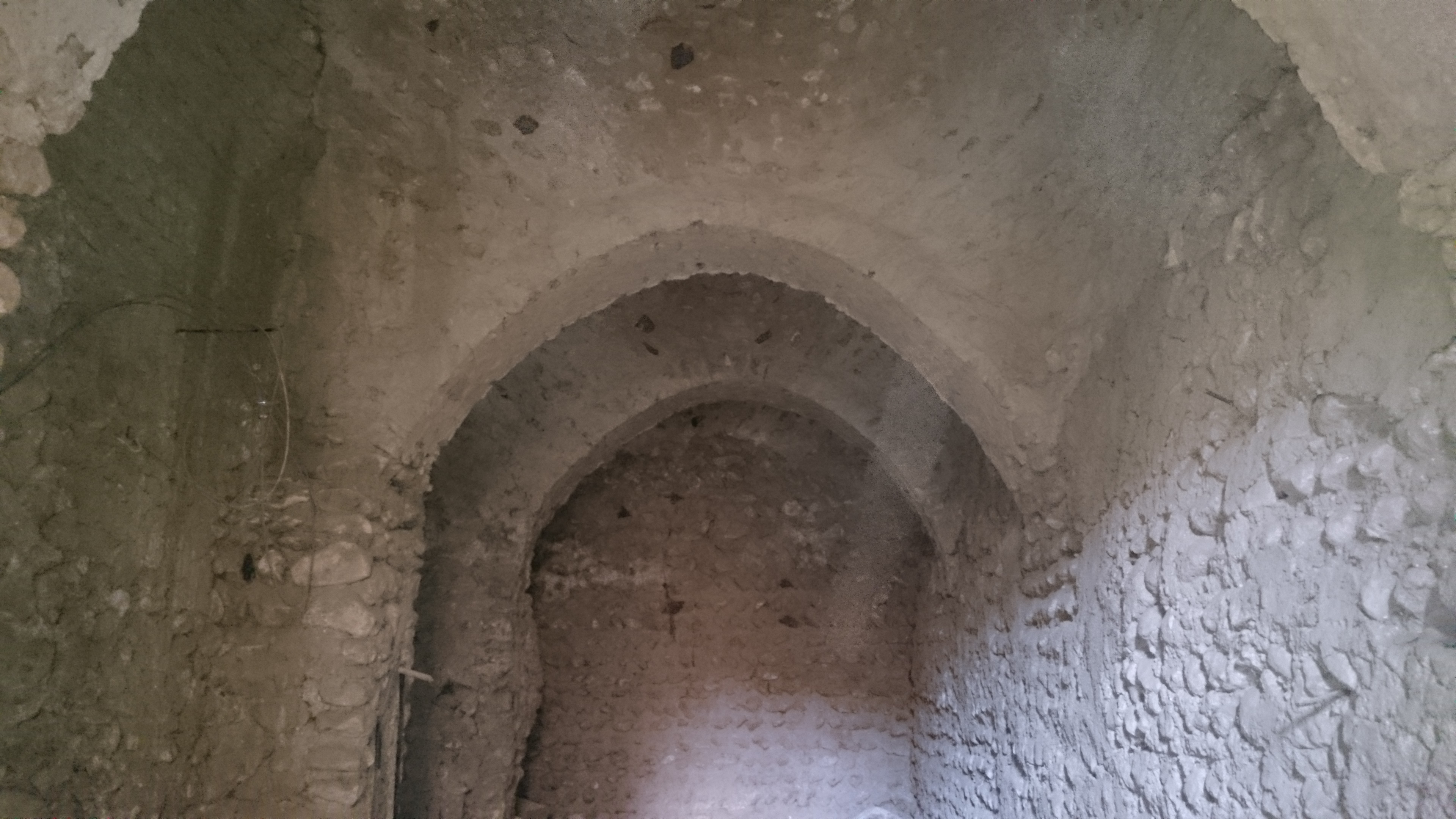 یخچال فدیمی یخاره حاصار